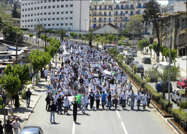 Marche des résidents algériens d'El Mouradia à l’hôpital Mustapah Pacha d'Alger (Algérie).